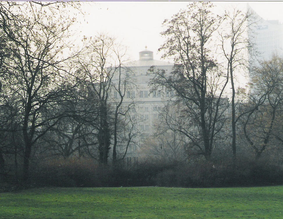 Park an der Rückseite vom Opernhaus Leipzig